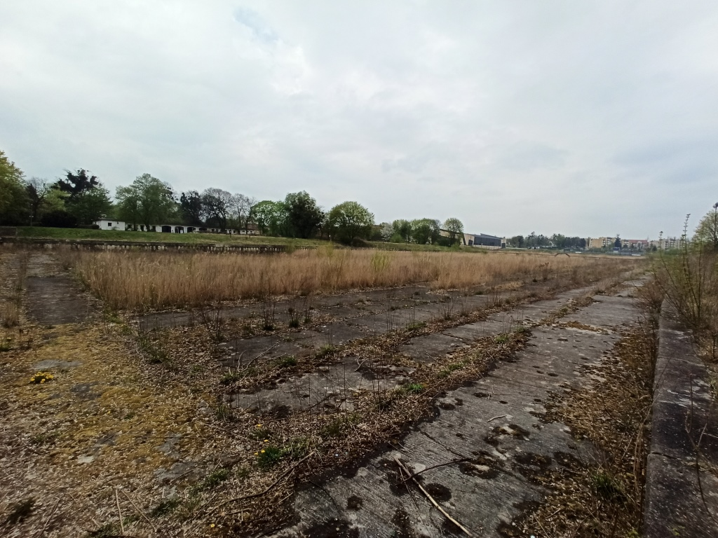 Elbląg basen odkryty 1934, ruina rok 2020